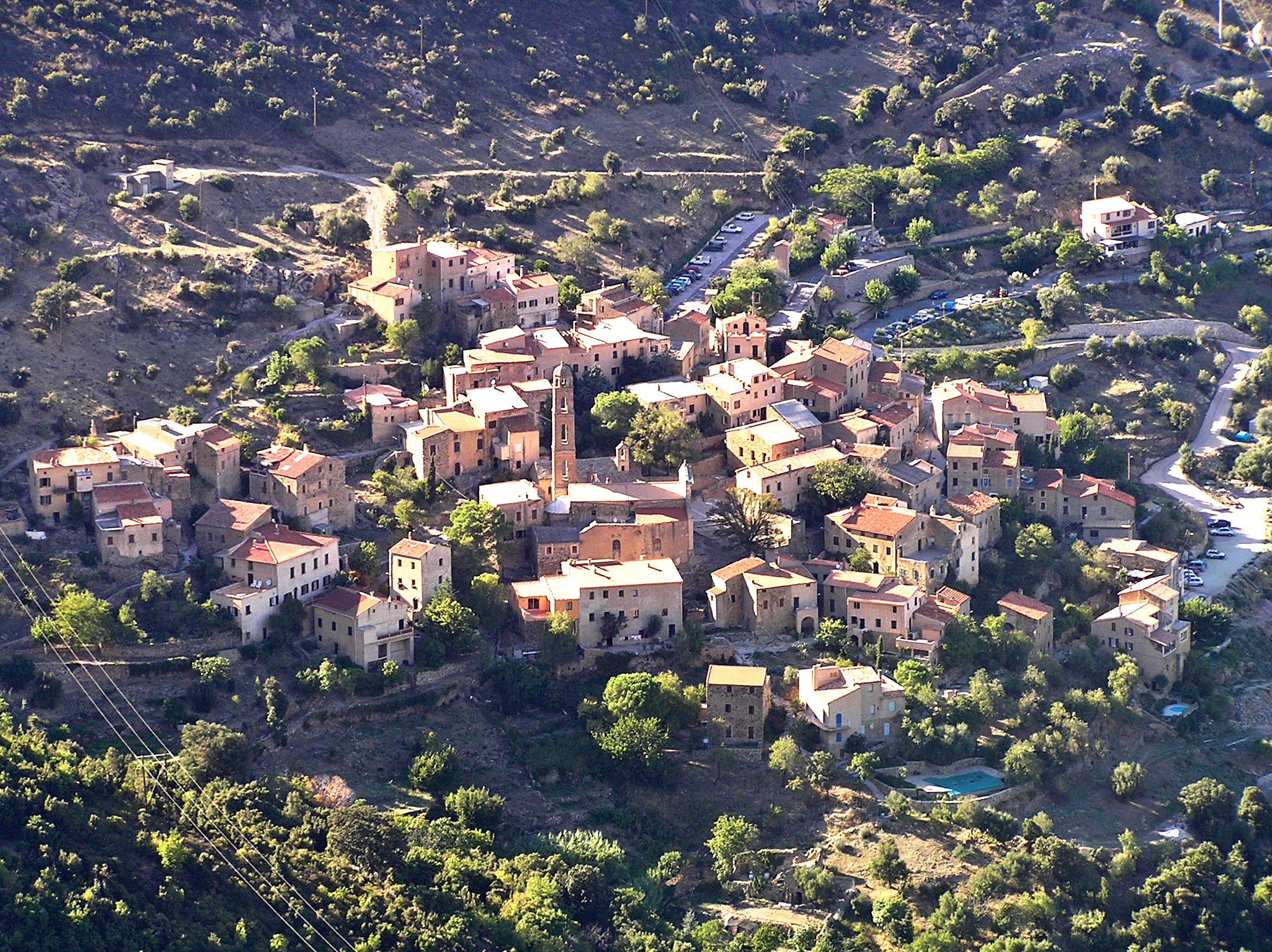 Palasca (Corsica) - Vue du village